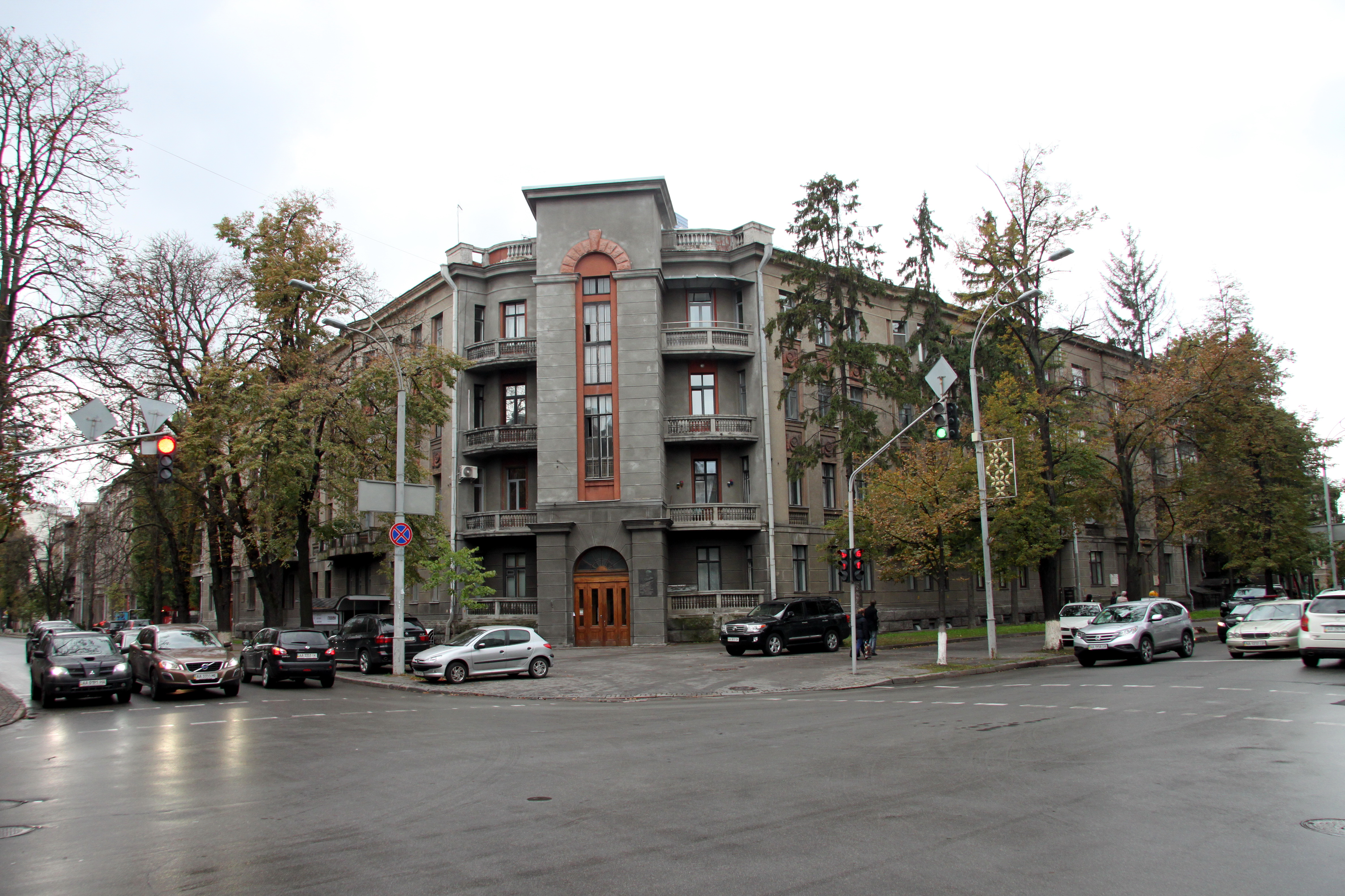 Другий житловий будинок працівників Ради народних комісарів УРСР, в якому проживали: у 1943—1960 рр. Козицький П. О., композитор; у 1937—1941 рр. Коротченко Д. С., у 1944—1959 рр. Мануїльський Д. З., державні і партійні діячі УРСР, Київ, Інститутська вул., 20/8